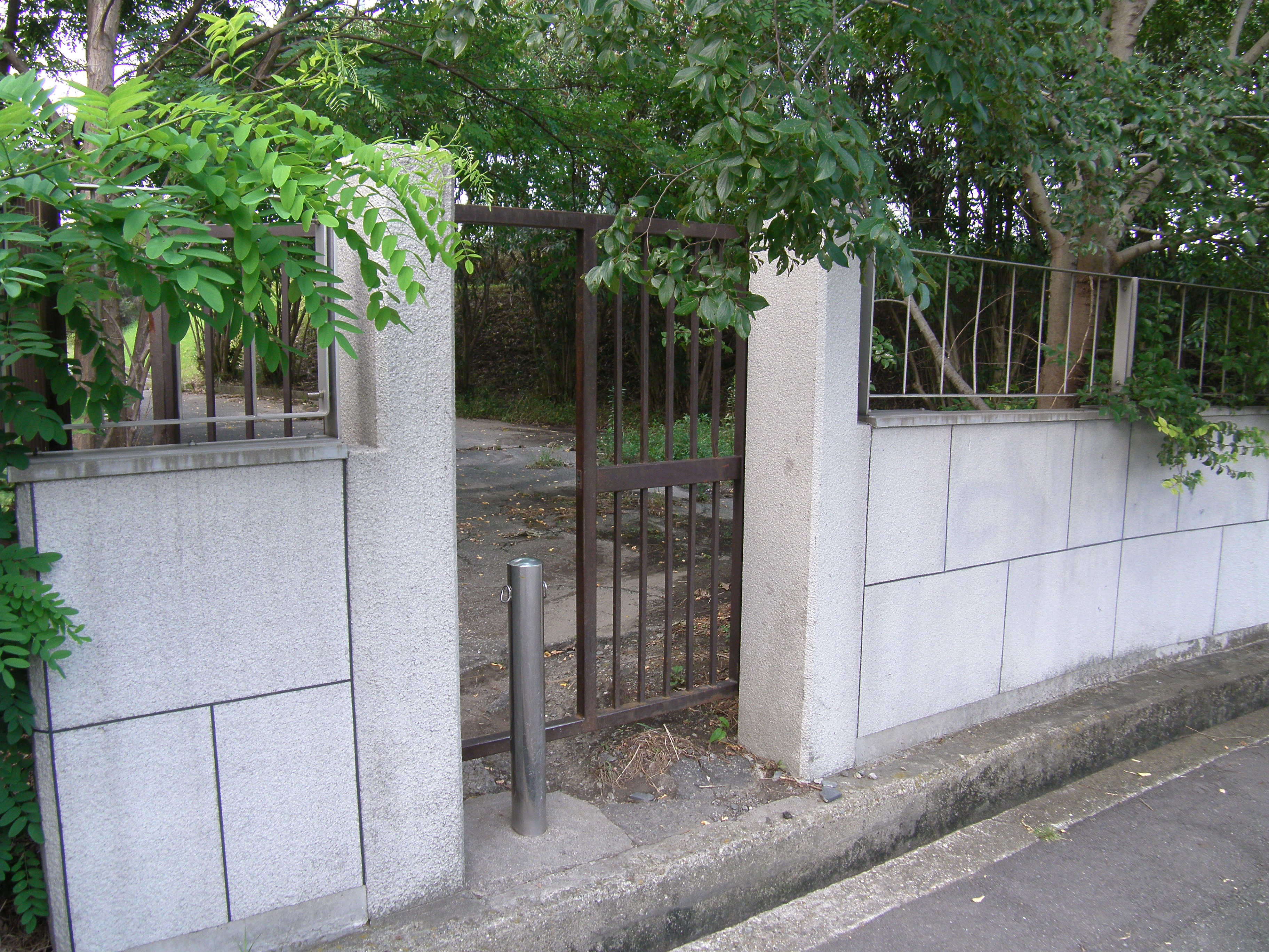 大阪大学吹田キャンパス万博通用口。 茂みの向こうは陸上競技場。 2008年9月23日に投稿者が撮影。